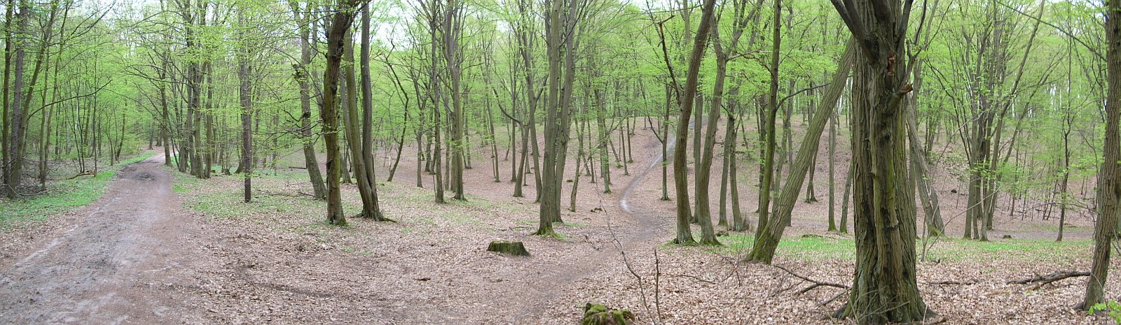 Grądy w Myślęcinku w Bydgoszczy